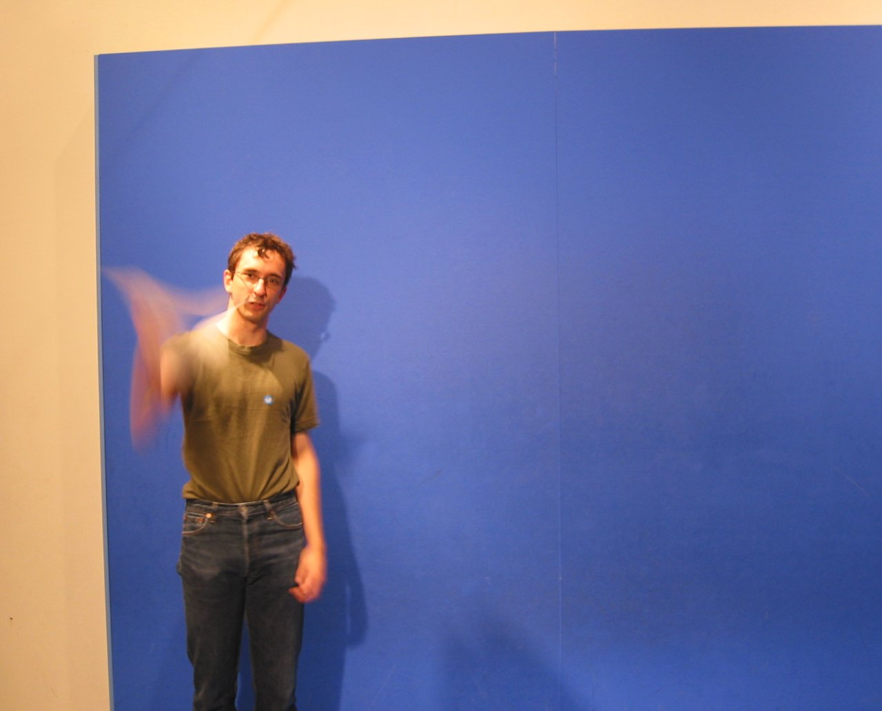 Driessel in a bluebox